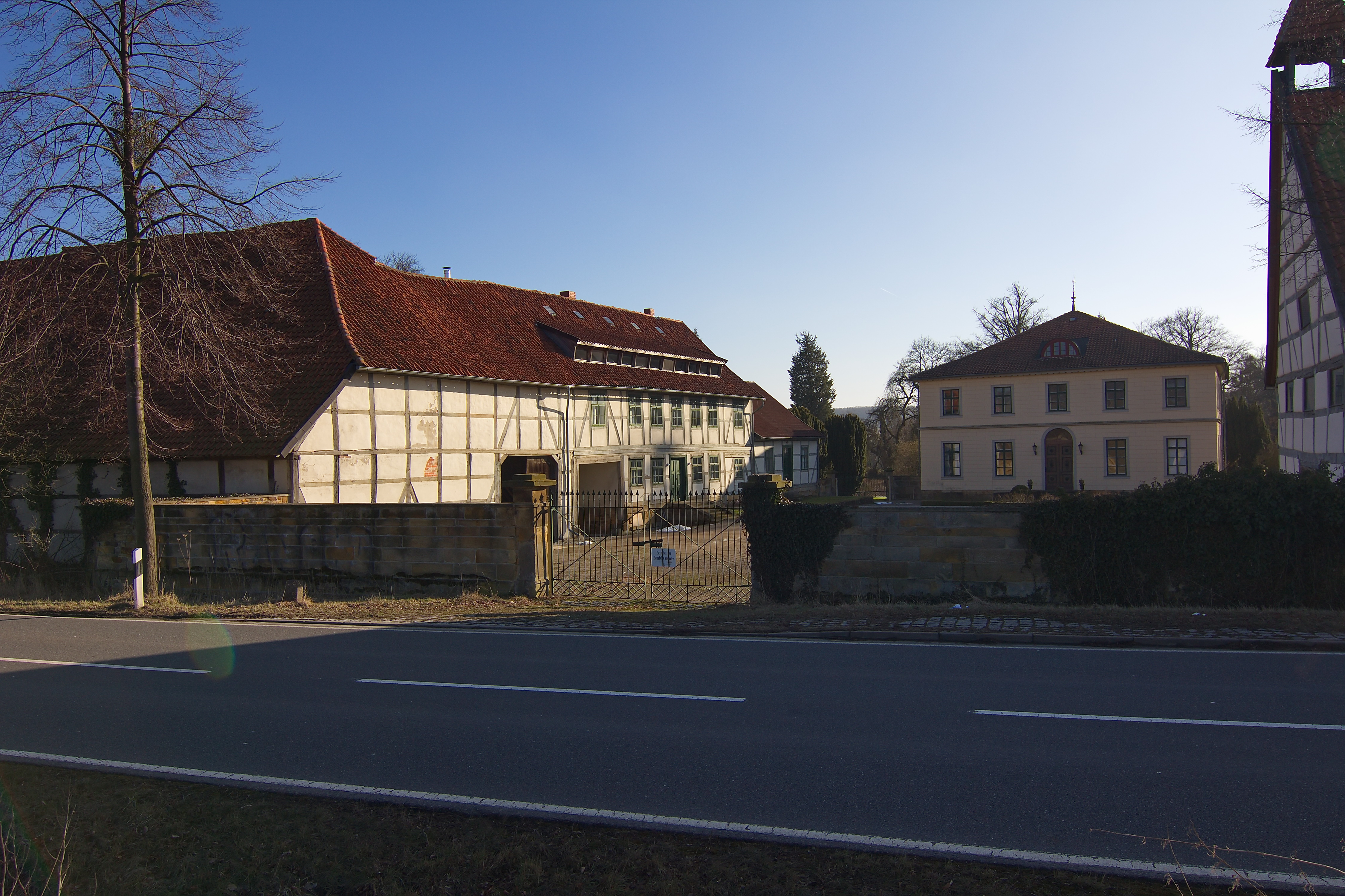 Das Gut Walshausen von 1829 in Heinde (Bad Salzdetfurth) wurde nach Plänen des hannoverschen Architekten Laves errichtet.